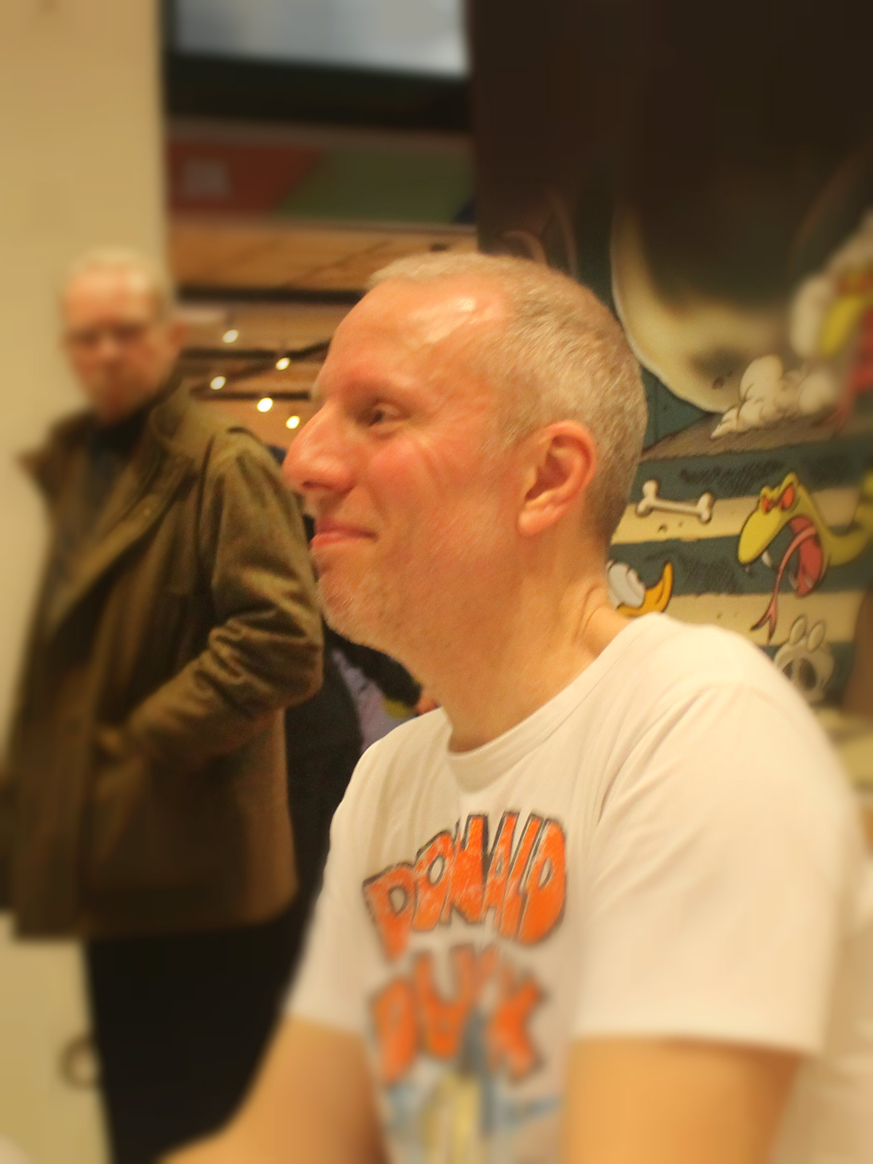 Flemming Andersen på Bogforum 2019.